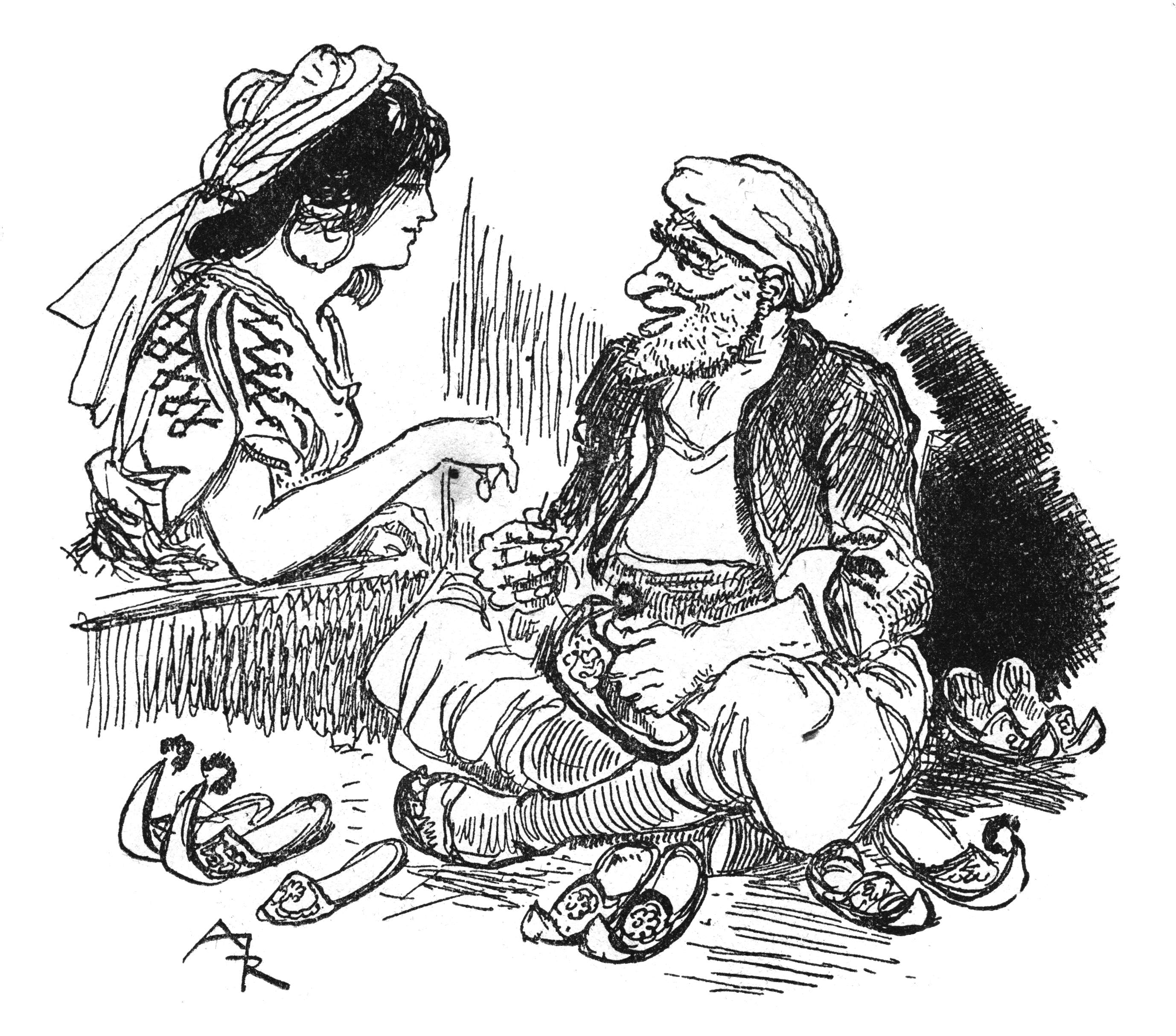 Ilustración de Albert Robida de Ali Babá y los cuarenta ladrones, página 7.